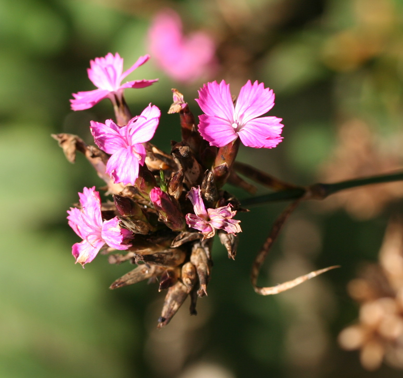 Dianthus giganteus im Botanischen Garten Dresden